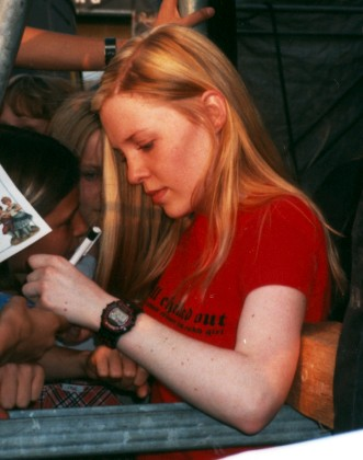 Die Schweizer Sängerin Kisha beim Autogrammeschreiben nach ihrem Auftritt beim Schüler Rock Open Air am 16. Juli 1999 in Dresden.